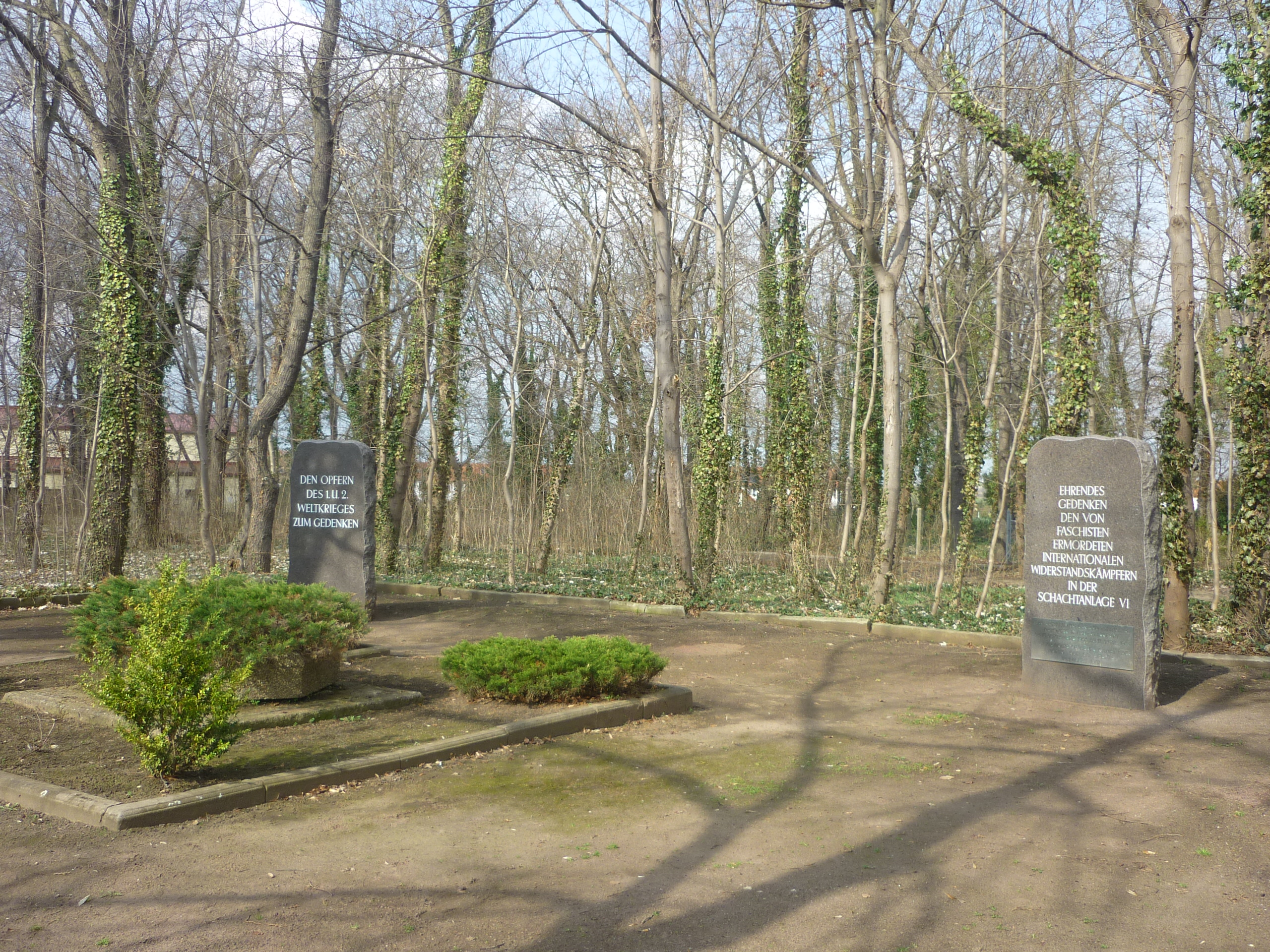 OpdeLö